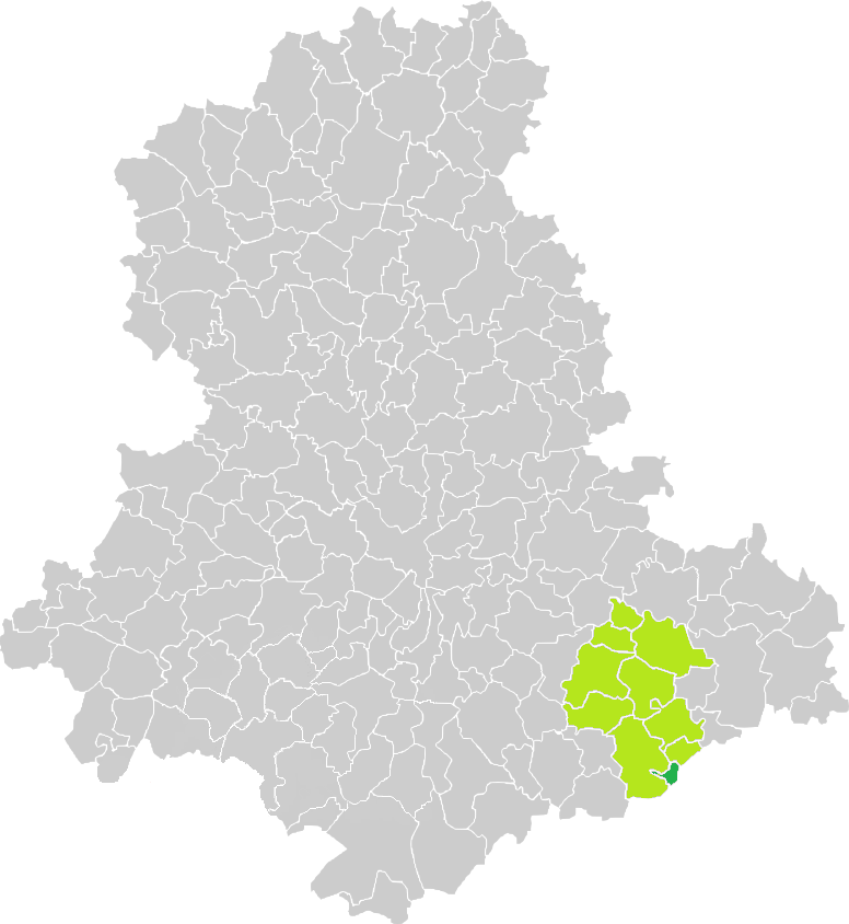 Carte de situation de la commune de Surdoux (en vert foncé) dans le votre Canton (en vert clair) sur une carte des communes de la Haute-Vienne